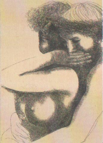 Opera di Greco, da una foto del 1997, scansionata. Titolo: Commiato n. 23.